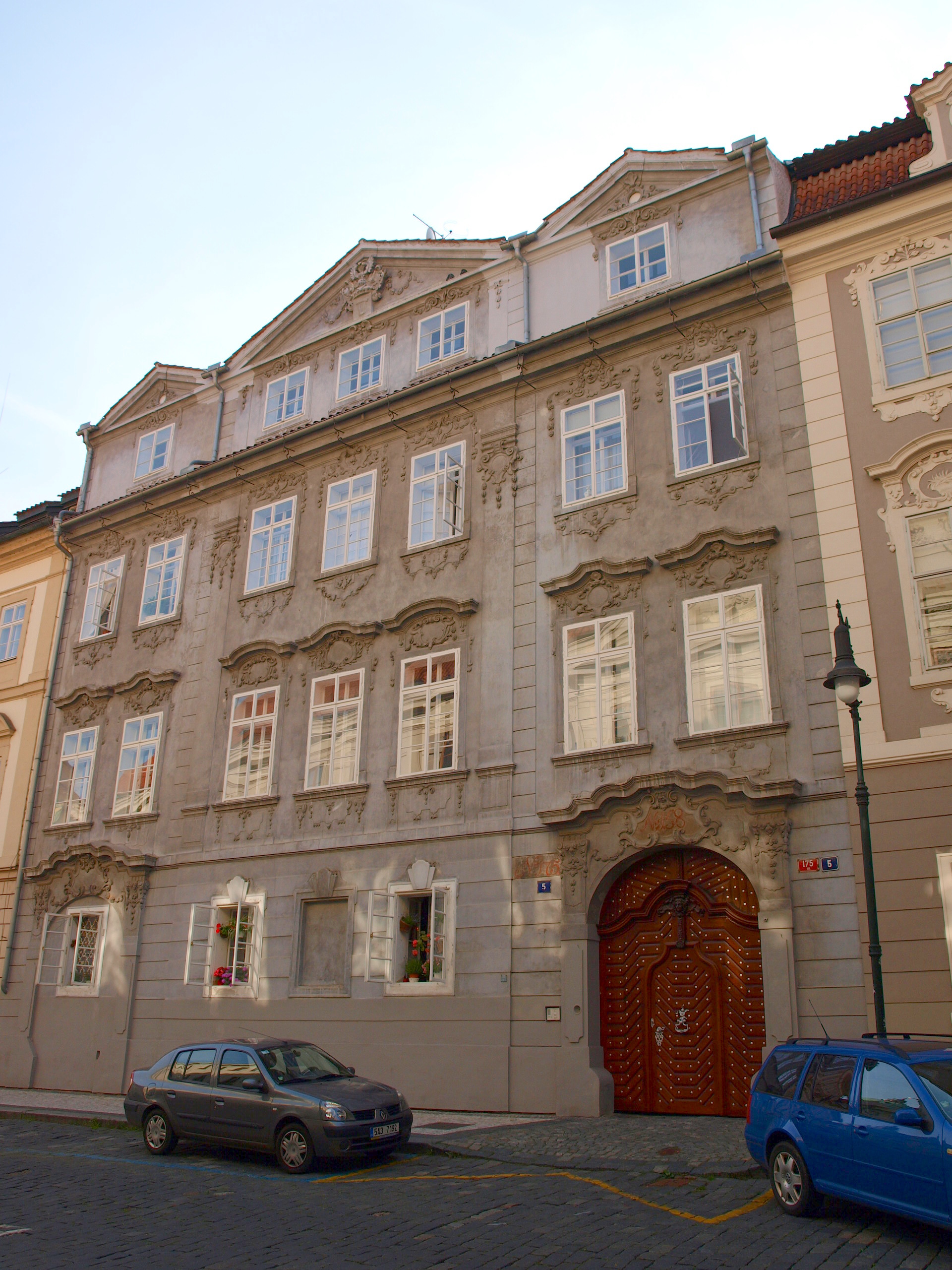 Palác Lažanských (Malá Strana)